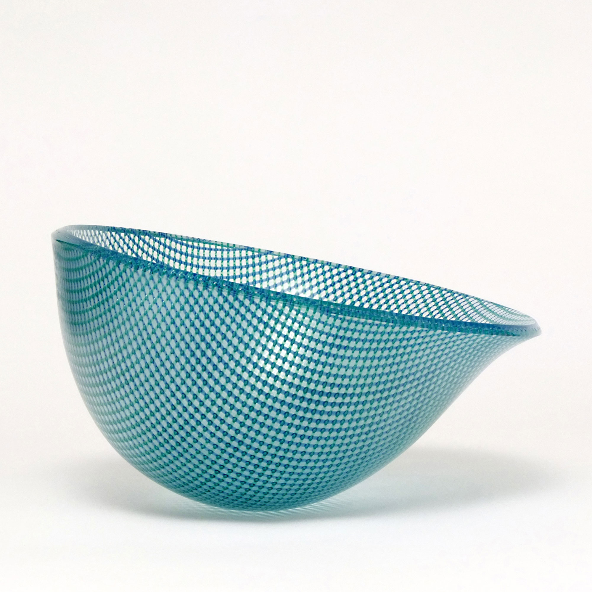 Gefäß, Verschmelztechnik, Jahr 2006, Beschreibung: mit Email eingefärbtes Klarglas, Rand poliert, Größe: 29 x 28 x 16cm